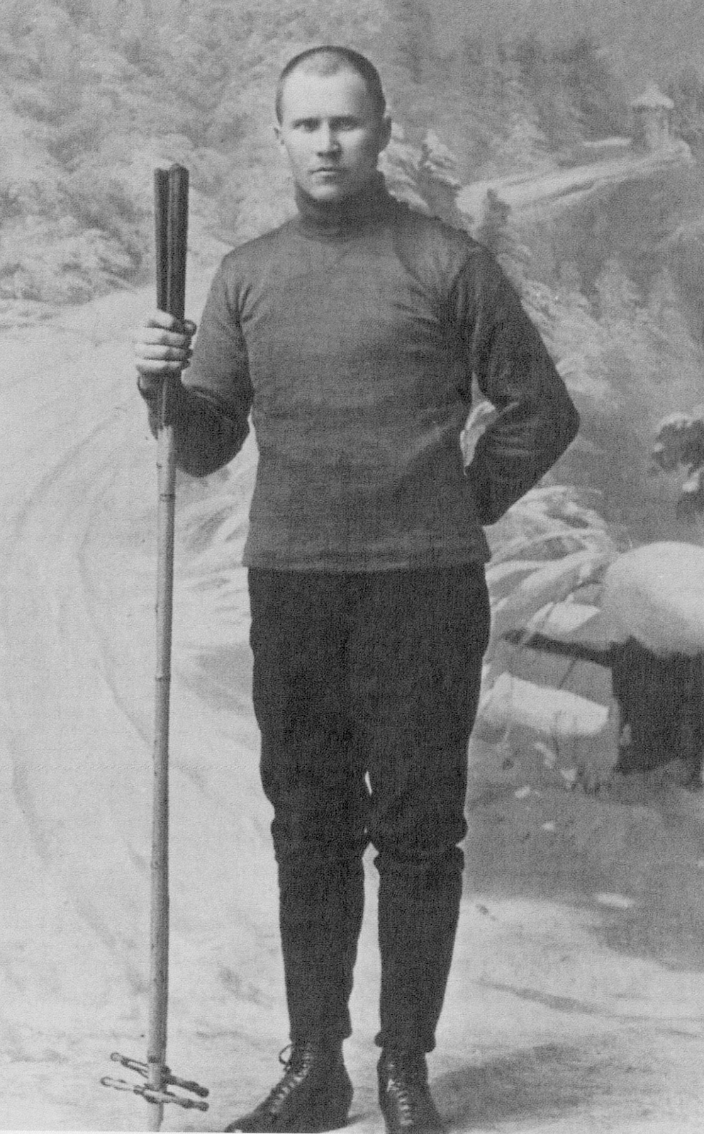 Anton Collin